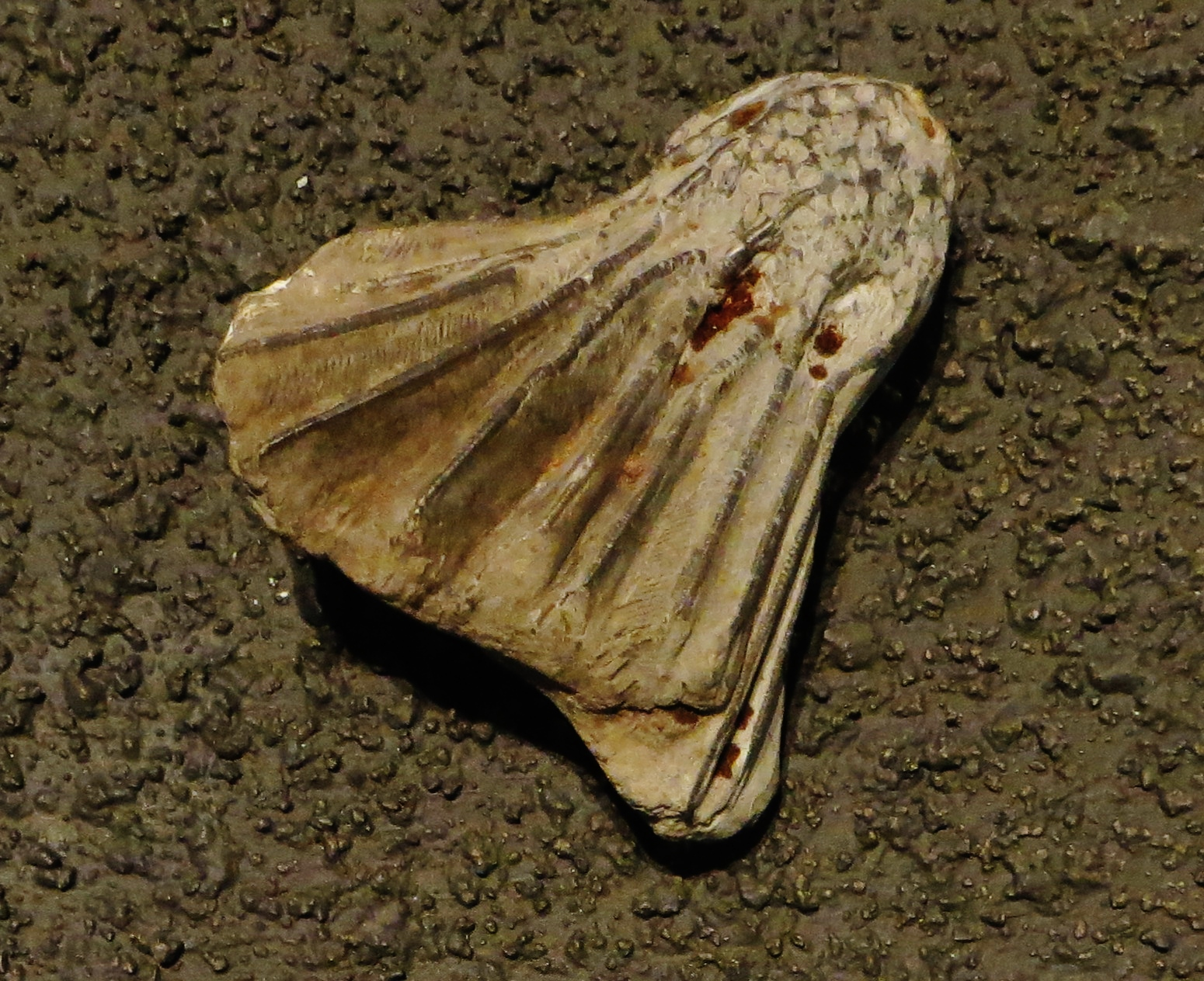 Fossil of Glyptocrinus - Took the picture at Naturalis, Leiden